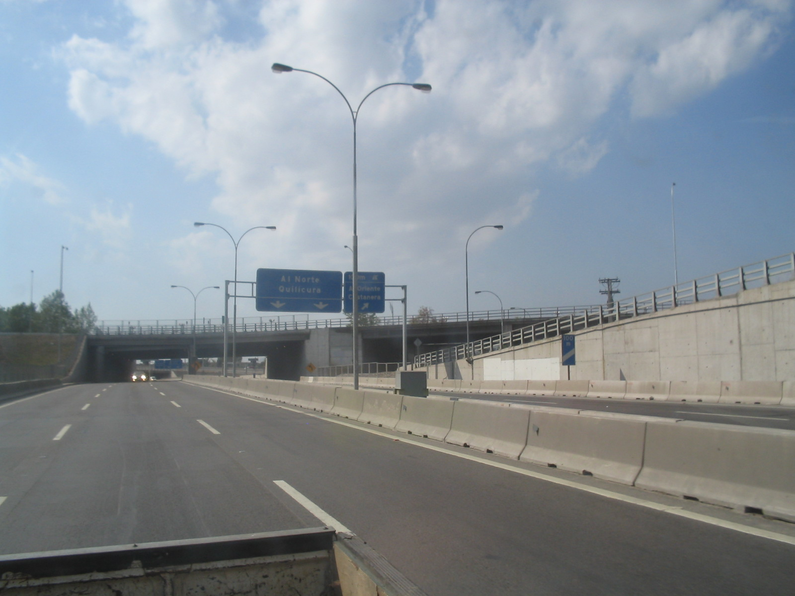 Autopista Central. Antes de llegar a Enlace Costanera taken by Emilio Sepúlveda (DJ Funkin'mixer)